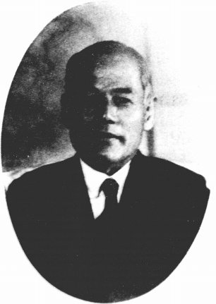 穂積真六郎